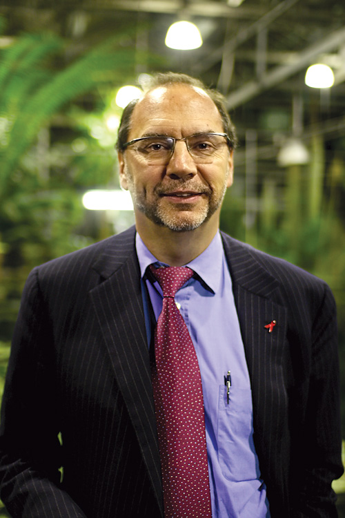 picture of Peter Piot